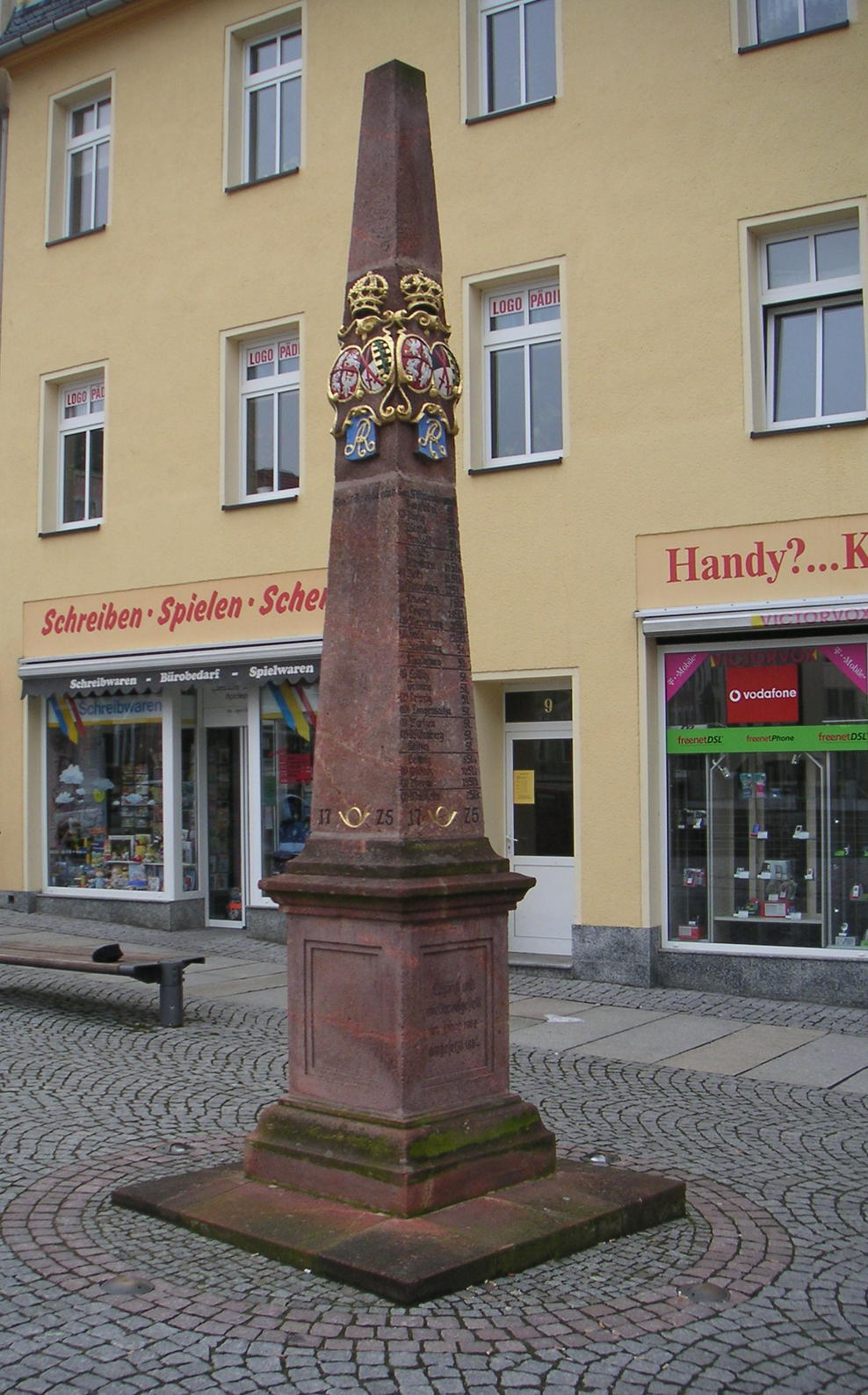 Kursächsische Distanzsäule (rekonstruiert) von 1725 in Mittweida